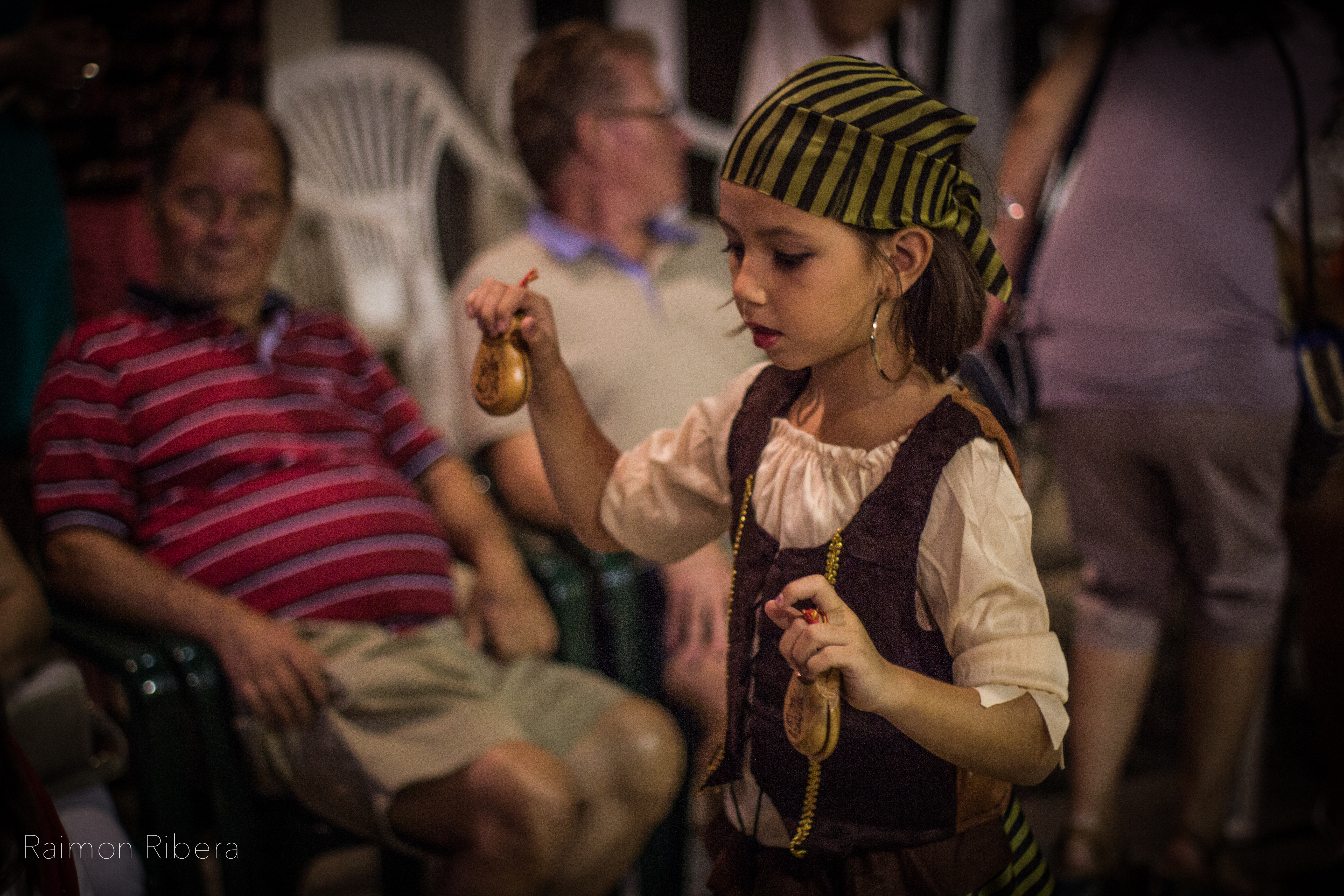 Danses de Guadassuar 2015